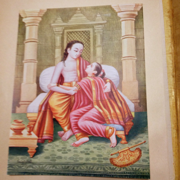 Chitra Ramayana (Illustrated Ramayana) is a simplified story of the great Indian epic in Kannada. The type is bold and beautiful. The thick pages have become brittle and need careful handling. Printed by B. Miller, Superintendent, British India, Press, Mazgaon, Bombay. It was published by, Shrimat Balasaheb Pandit Pant Pratinidhi, chief of Aundh, at Aundh, Satara district. The Kannada version is by Ramachandra Madhwa Mahishi The date shown is 1916. It is all the more important because the book contains illustrations painted by the publisher also called Bhavan Rao Shrinivas Rao, the ruler of the state of Aundh himself.